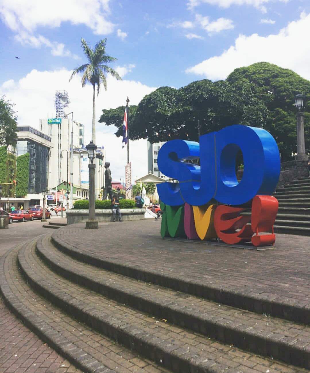 Tótem de la marca ciudad de San José en el Parque Central